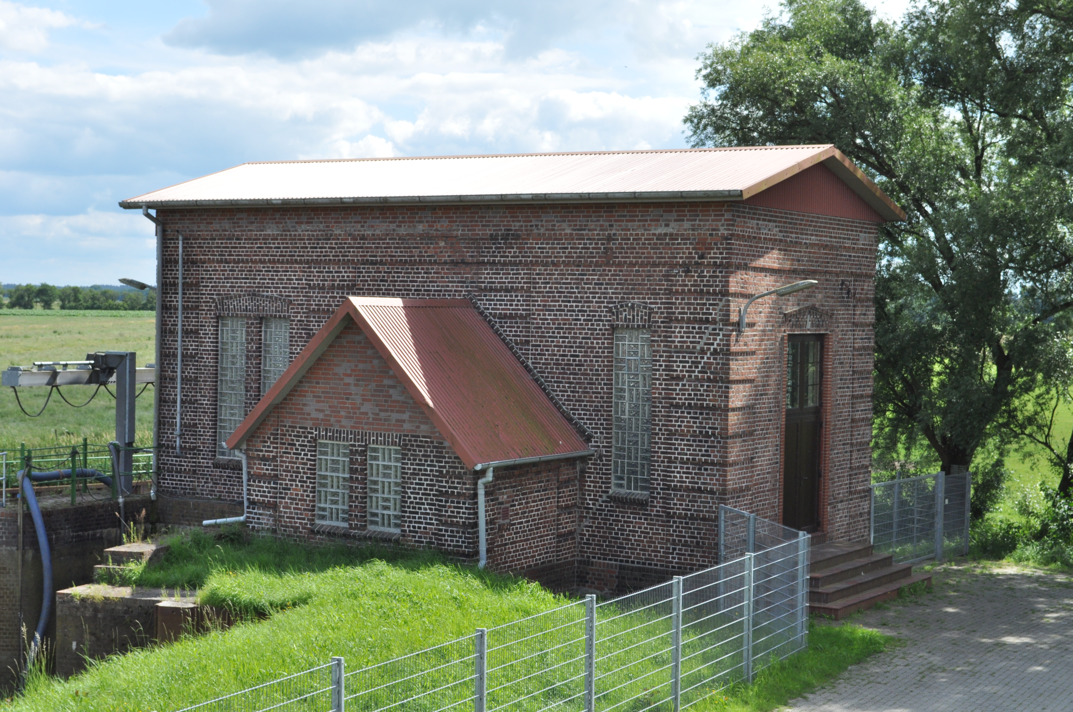 Schöpfwerk am Ostedeich bei Hemmoor-Basbeck. This is a photograph of an architectural monument. .202.200.037